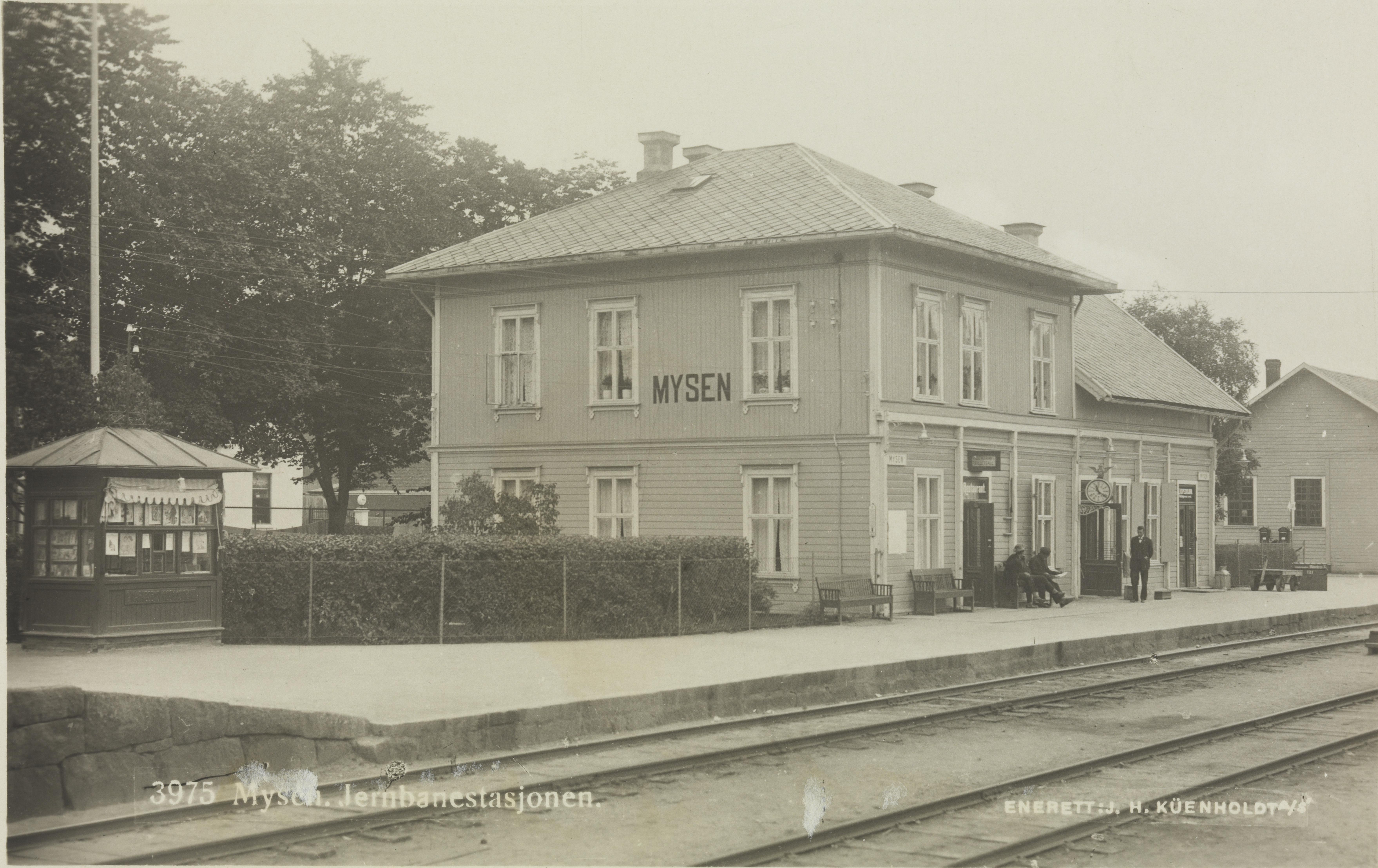 Gamle Mysen stasjon på Østfoldbanens Østre linje